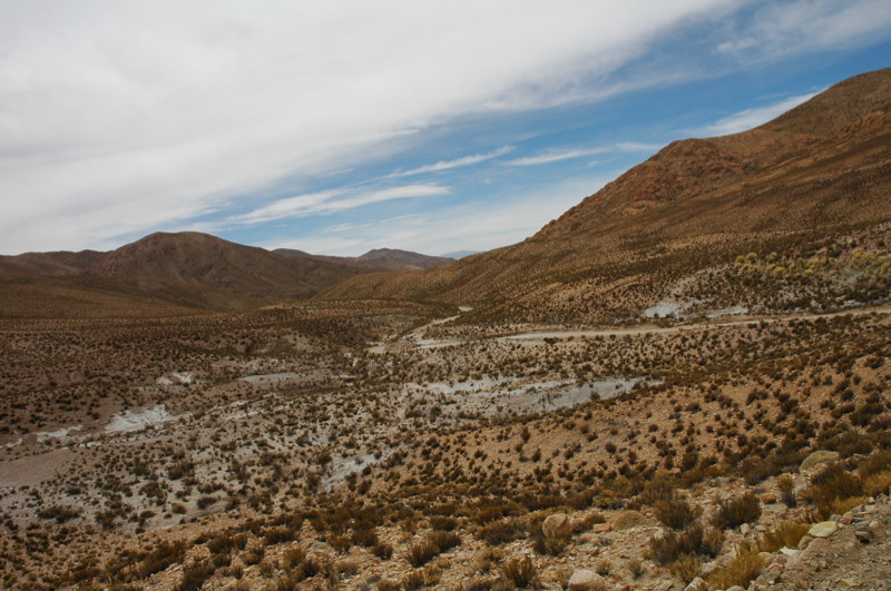 Argentina. Jujuy. Entre Abra Pampa y Susques